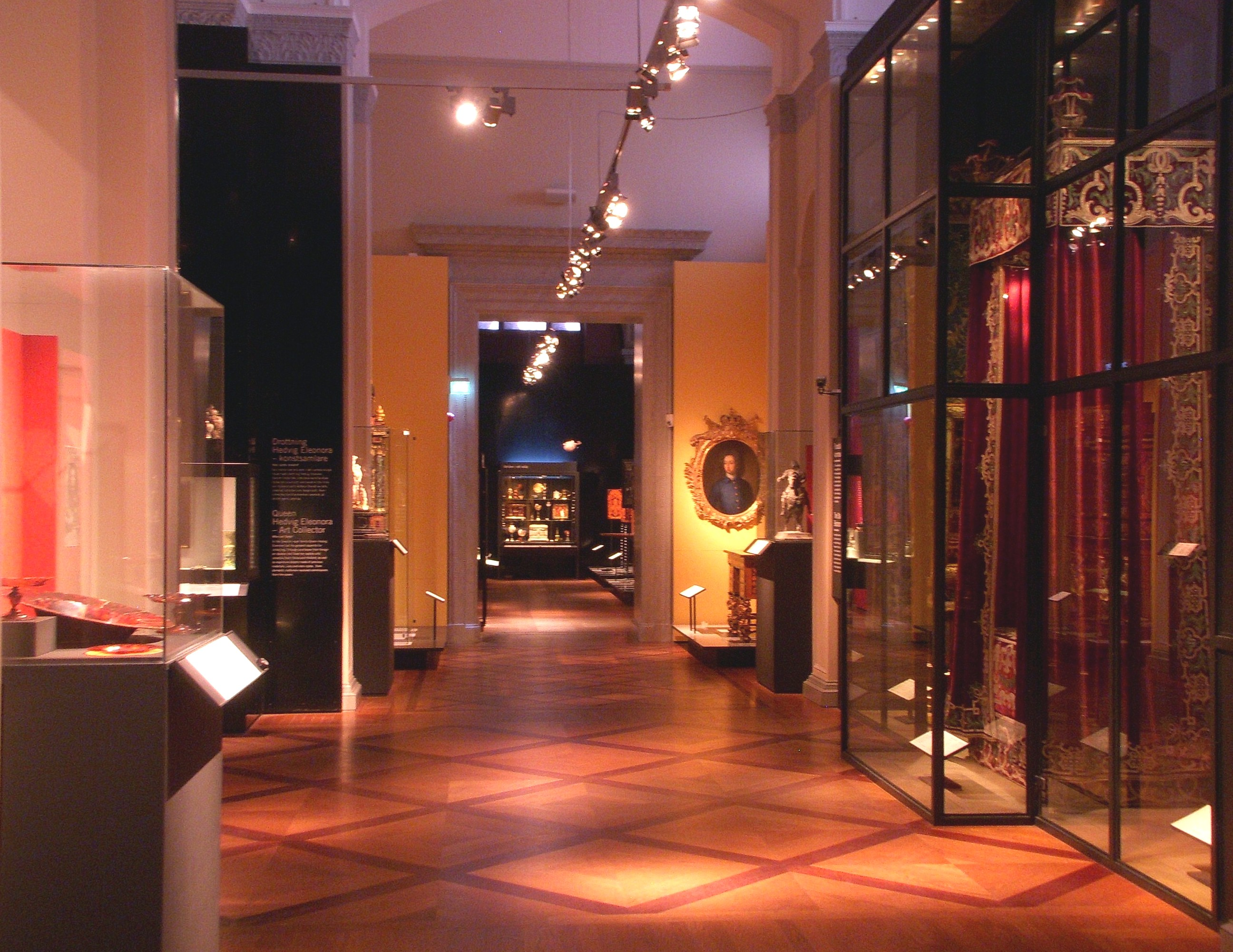 Nationalmuseum, Stockholm, sal "Formen i Sverige 1500-1740"